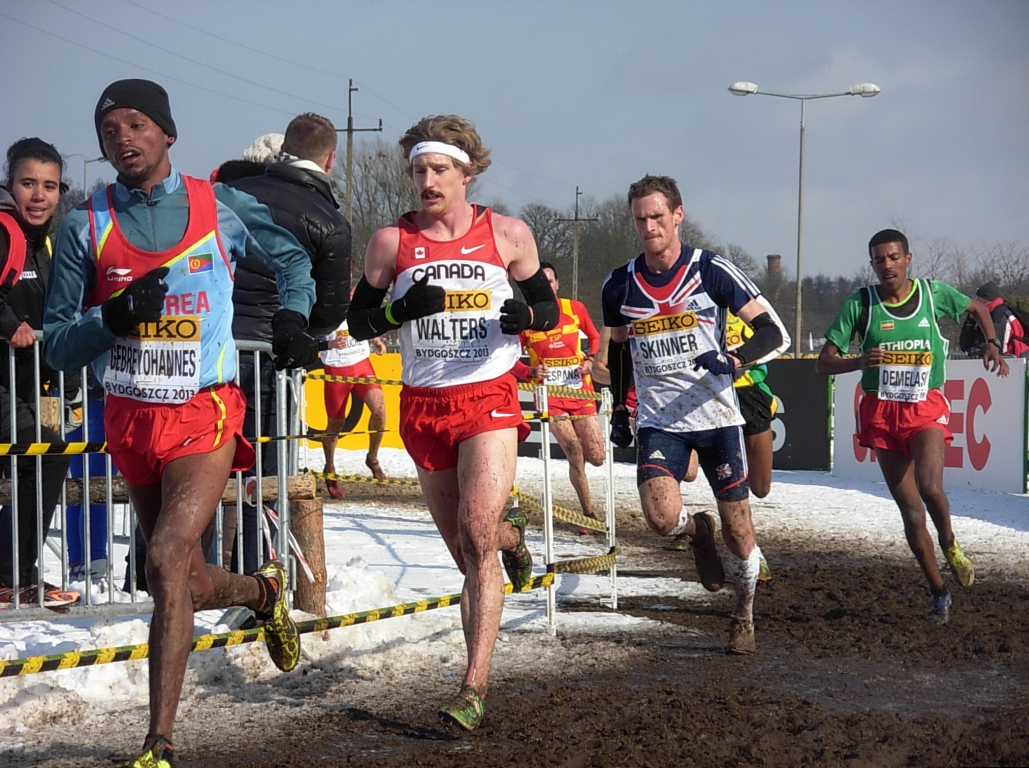 Mistrzostwa Świata w Biegach Przełajowych IAFF 2013 w Leśnym Parku Kultury i Wypoczynku Myślęcinek w Bydgoszczy